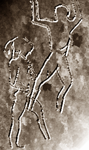 Grotta dell'Addaura (Palermo, Italia) - Particolare